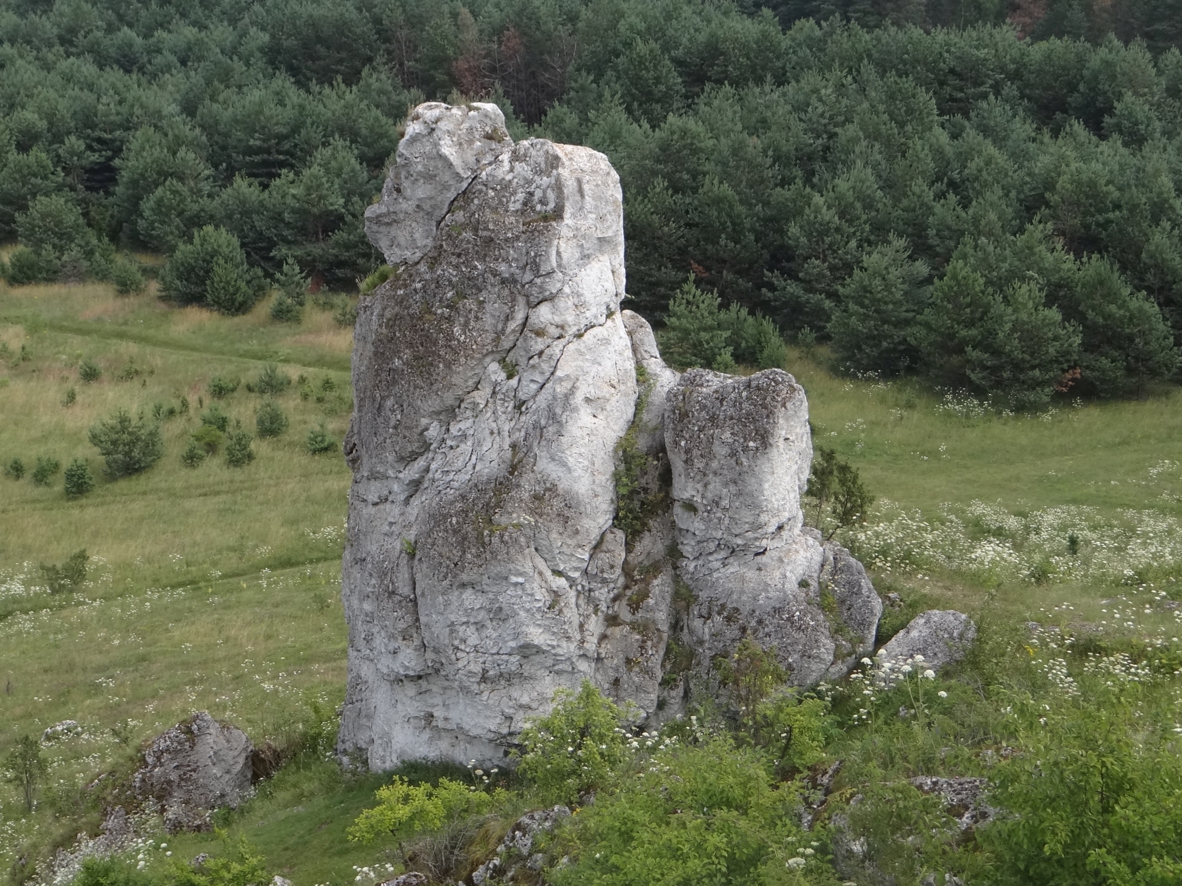 Skała Mnich w masywie Biakła koło Olsztyna